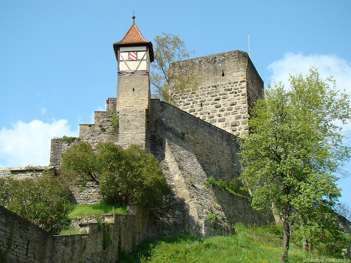 Bad Wimpfen, Burgviertel: Roter Turm mit vorgelagerten Wehrmauern und so genanntem Nürnberger Türmchen